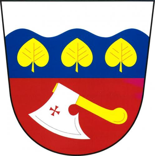 znak , Žeretice, okres Jičín